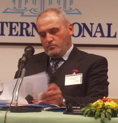 Veton Surroi, Kosovo. Photo: Bjørn Andersen, Tirana, 2003